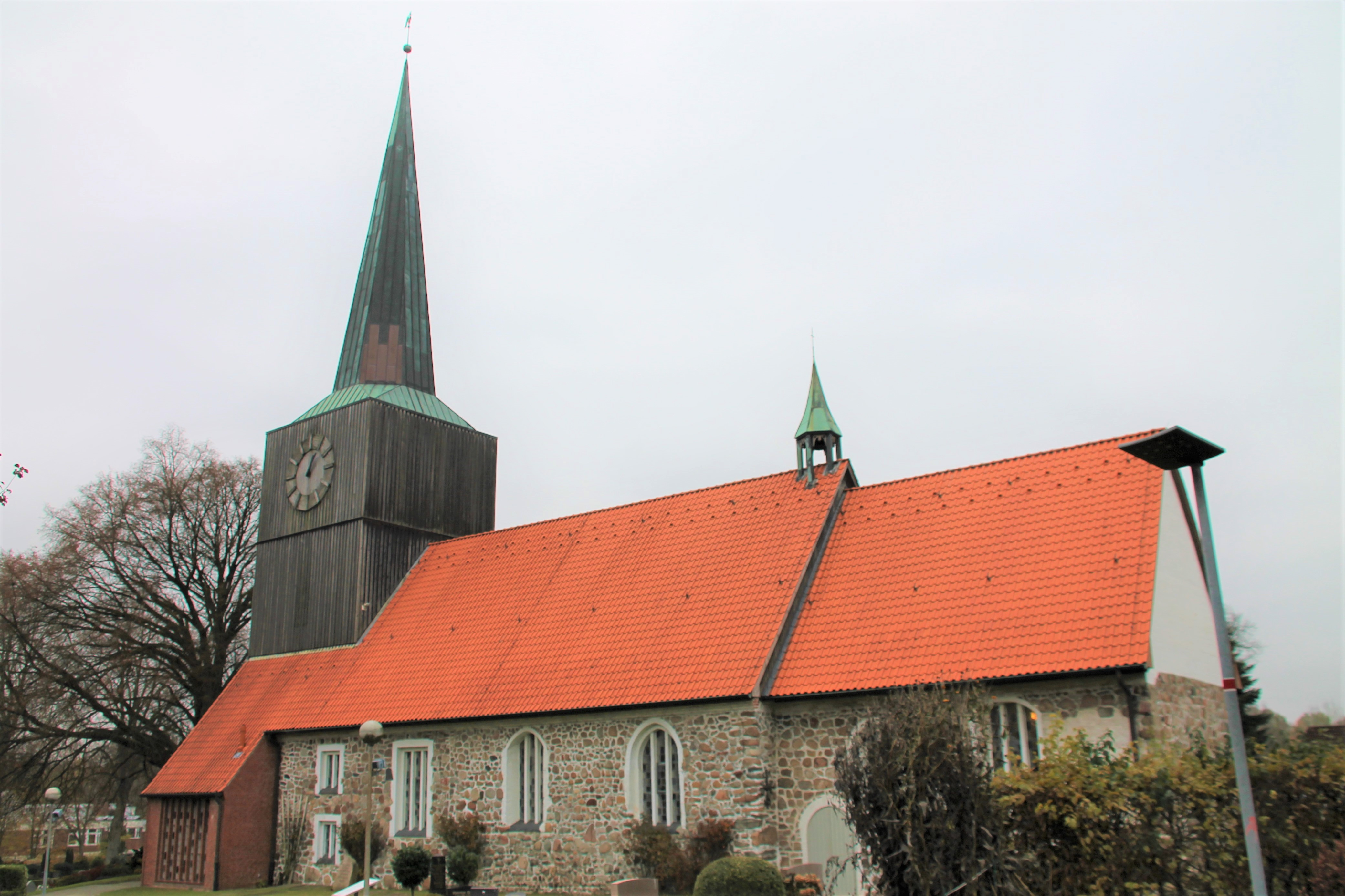 Blick auf die St. Remigius Kirche in Albersdorf